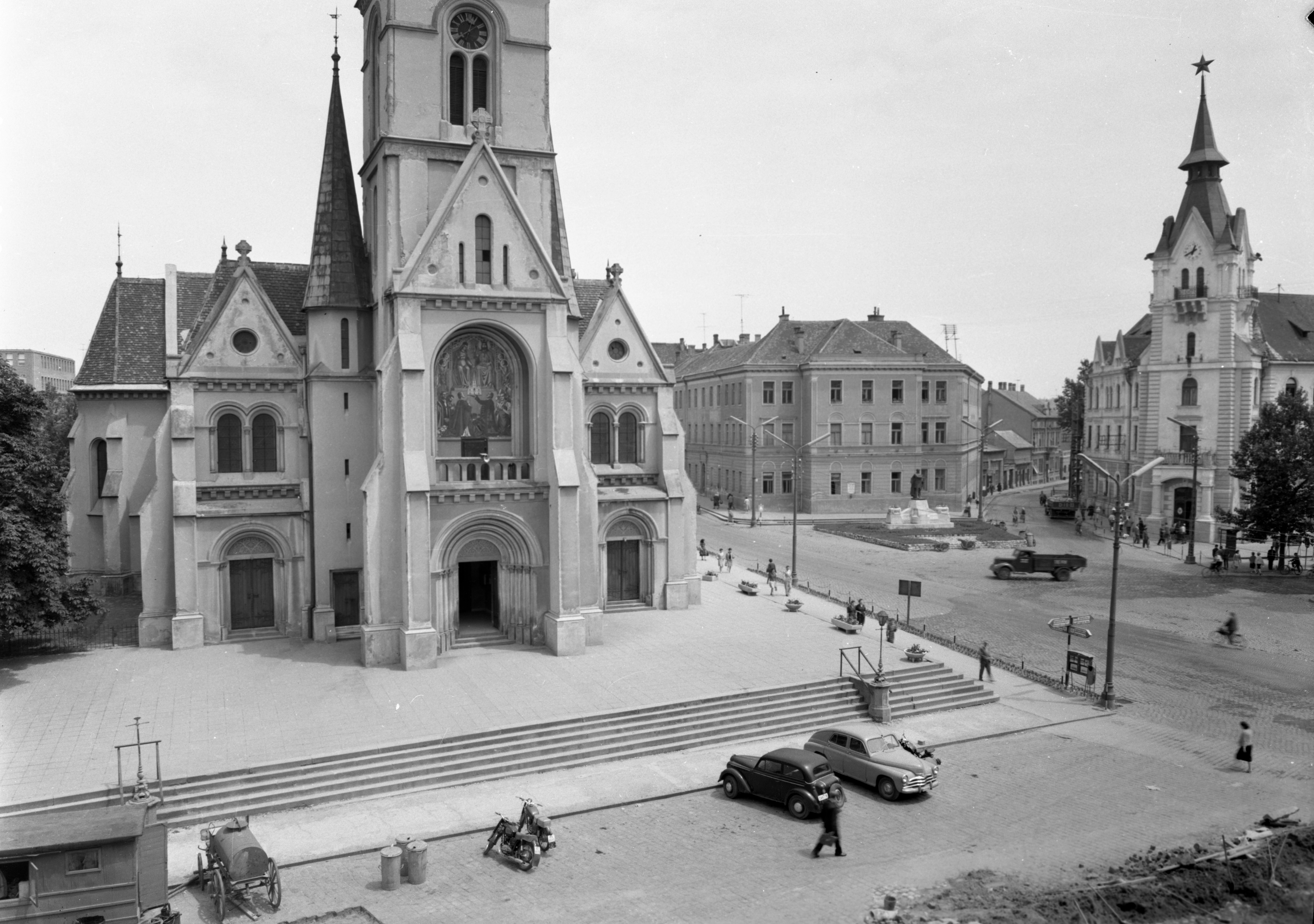 Kossuth tér, Nagyboldogasszony plébániatemplom (ma székesegyház). A Kossuth szobortól jobbra a Városi Tanács (ma Városháza) tornyos épülete. Location: Hungary, Kaposvár Tags: street view, church, traffic, automobile, commercial vehicle Title: Kossuth tér, Nagyboldogasszony plébániatemplom (ma székesegyház). A Kossuth szobortól jobbra a Városi Tanács (ma Városháza) tornyos épülete.